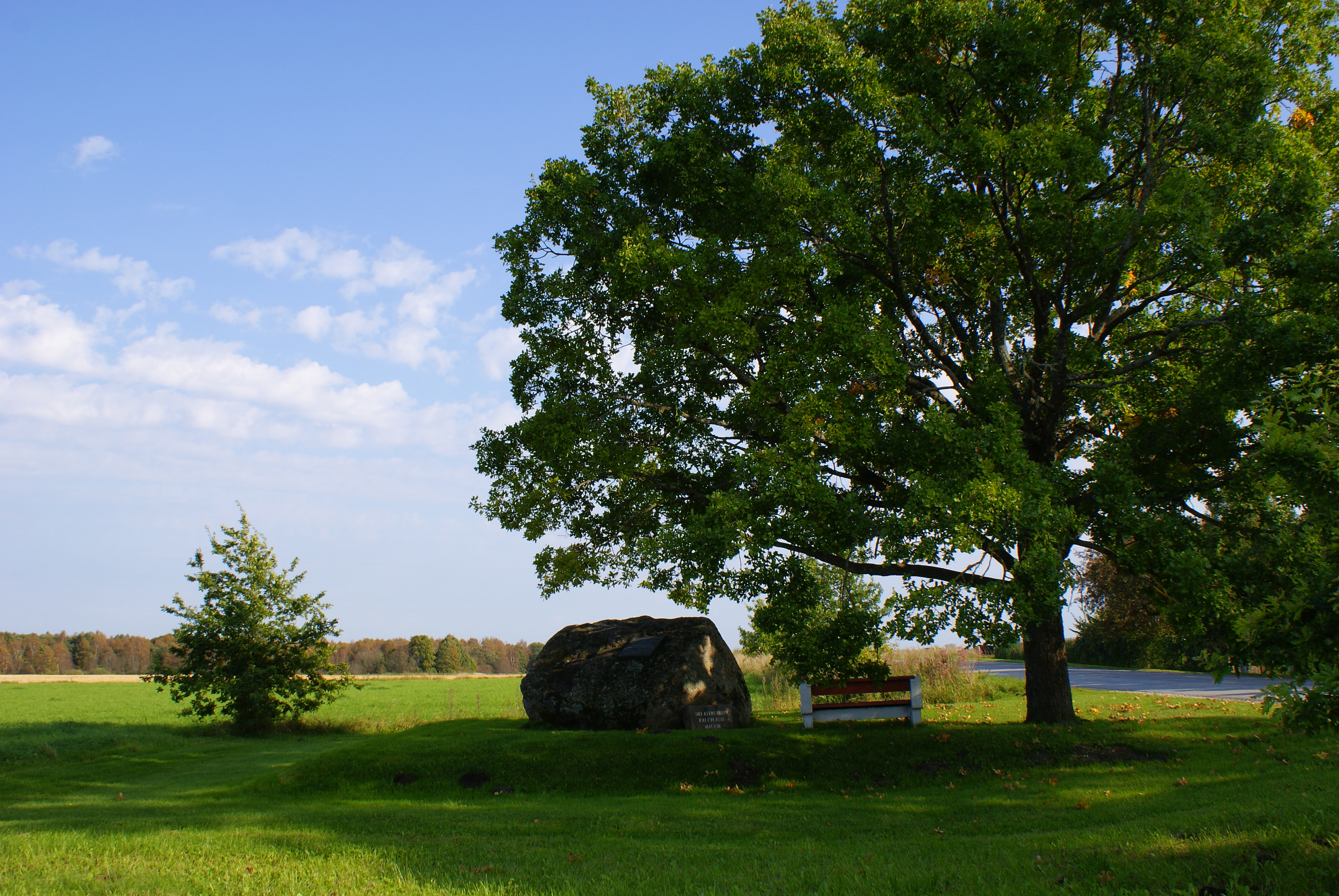 Vabadussõja Valkla lahingu mälestusmärk